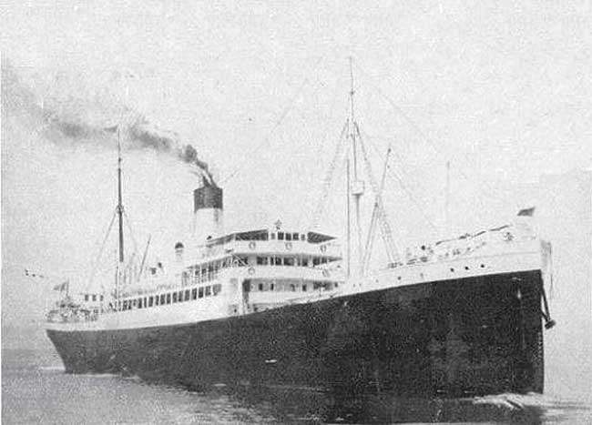 Navio a vapor Campos, afundado em outubro de 1943. Até 1917, quando foi confiscado pelo governo brasileiro, fora denominado Asuncion e era de propriedade da empresa alemã Hamburg-Sud.